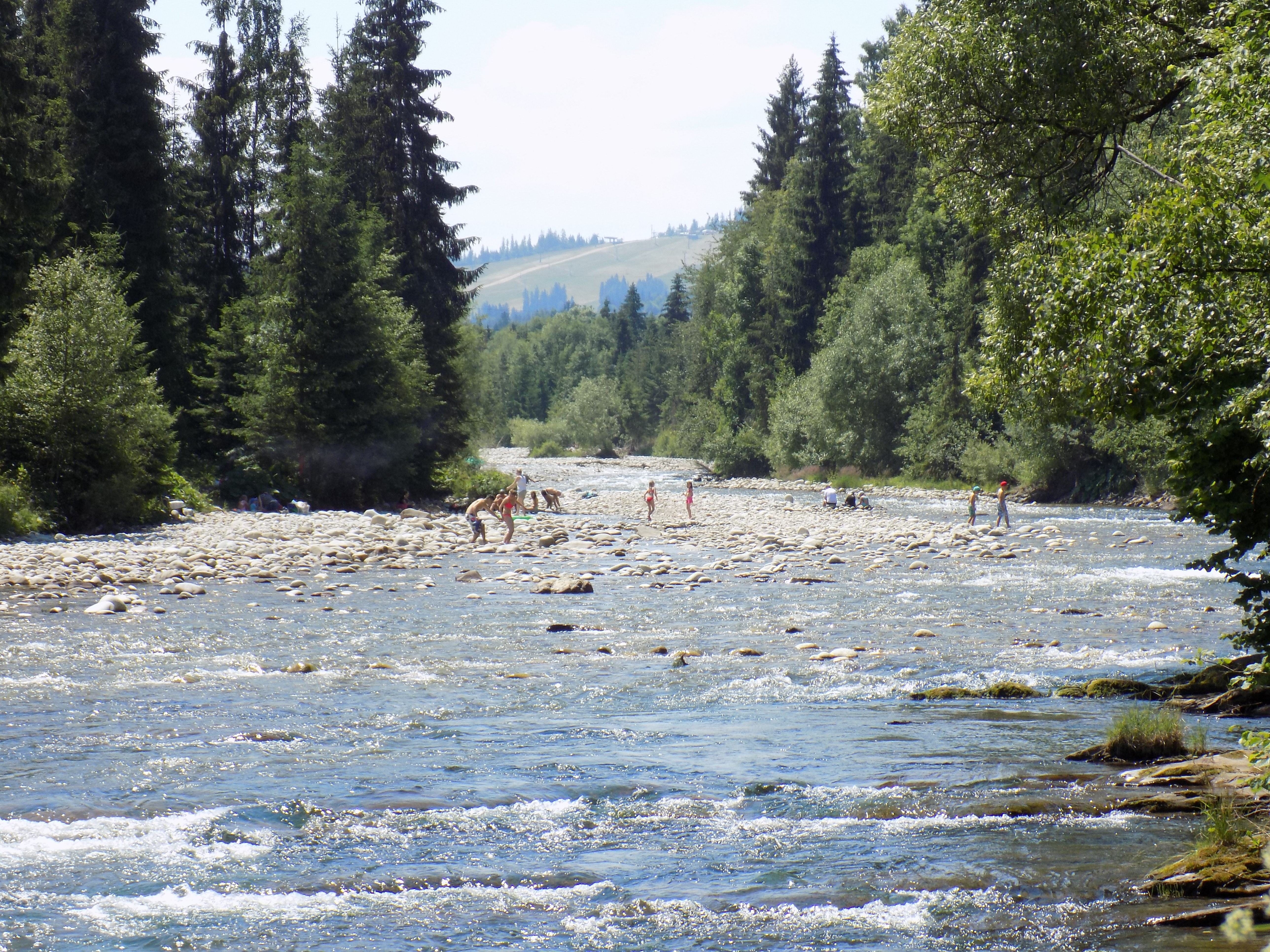 Specjalny obszar ochrony siedlisk: Dolina Białki This is a photography of protected area with CRFOP ID PL.ZIPOP.1393.N2K.PLH120024.H